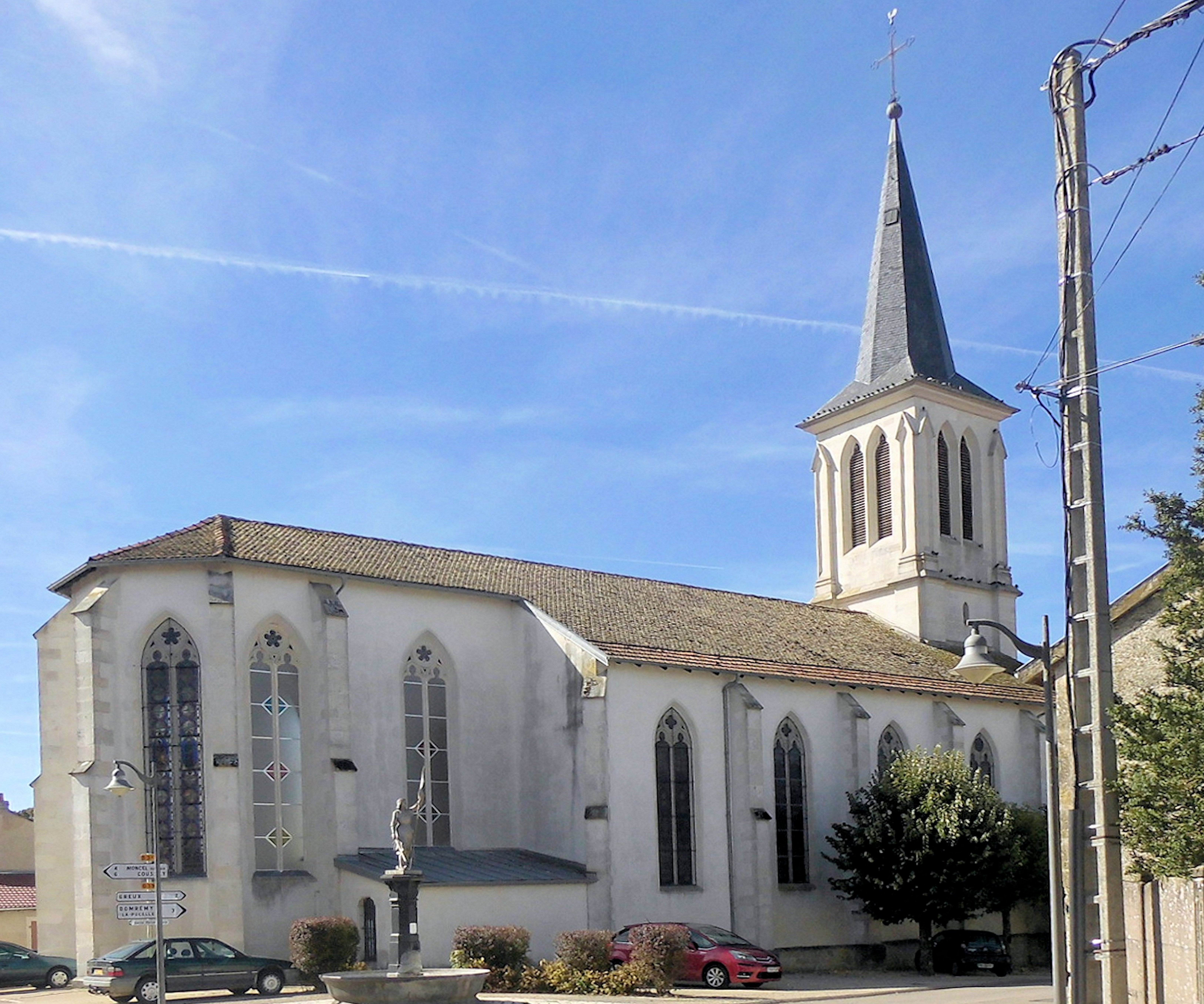 L'église de l'Assomption-de-Notre-Dame de Maxey-sur-Meuse